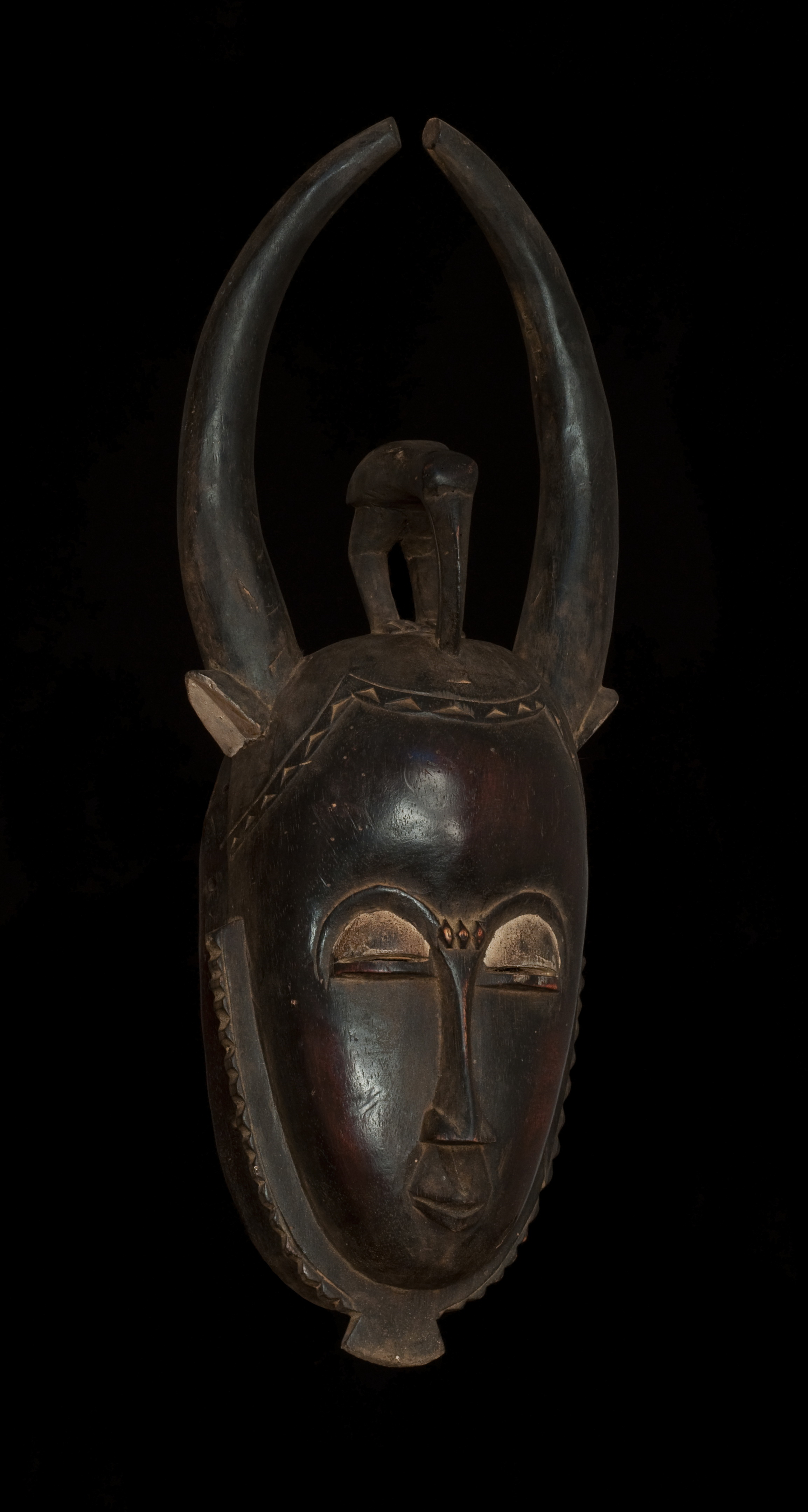 Masque baoulé de Côte d'Ivoire